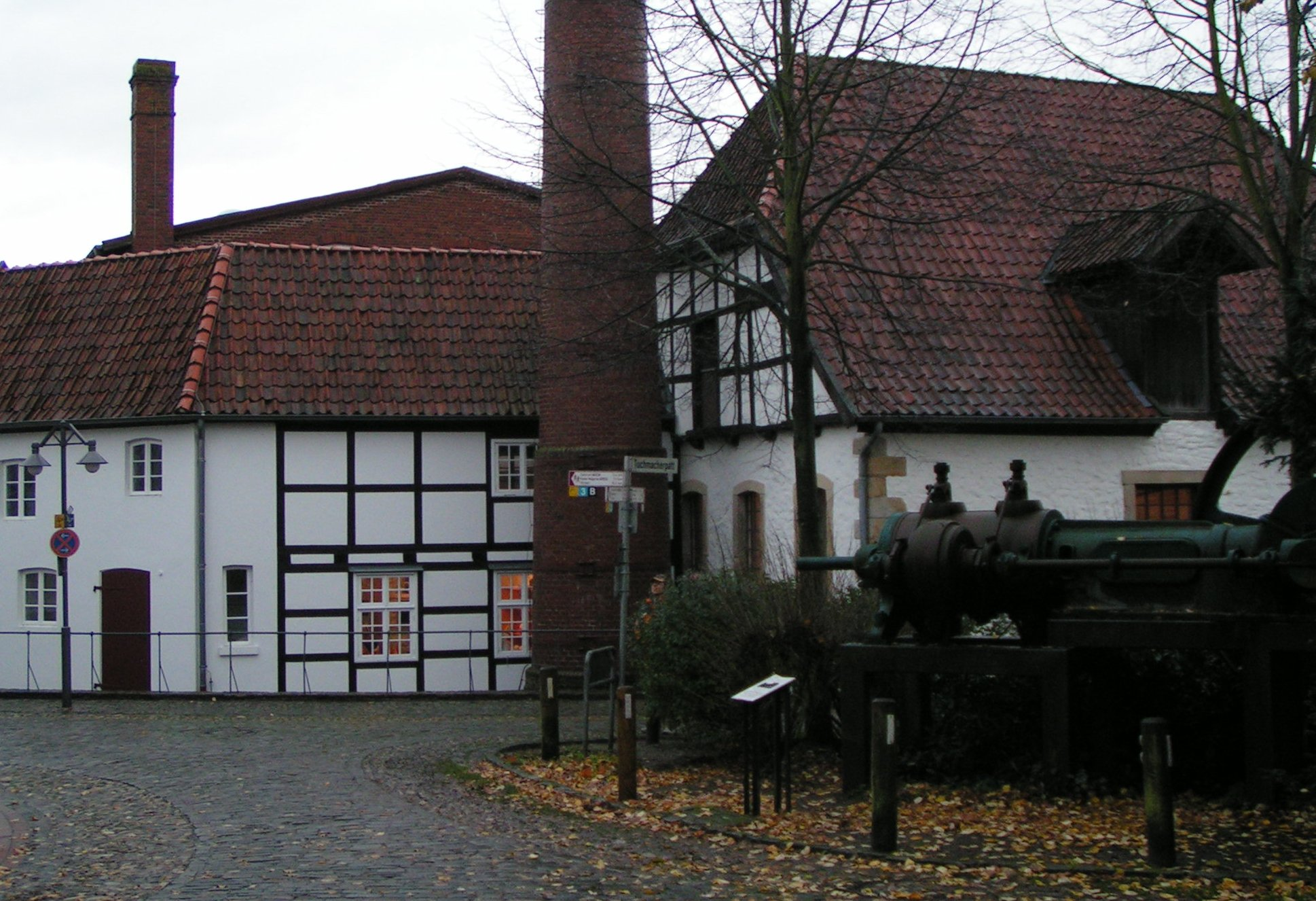 Tuchmacher Museum in Bramsche